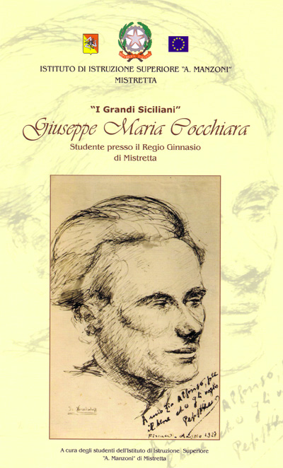 Giuseppe Maria Cocchiara